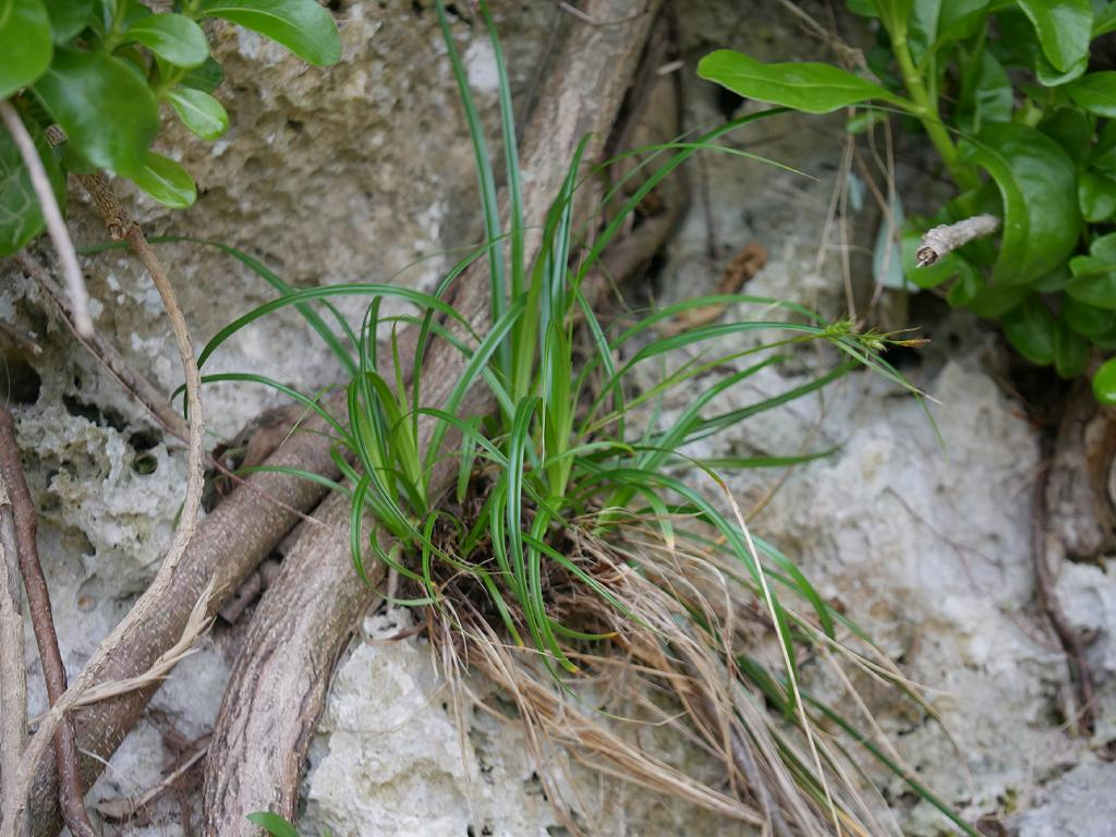 2018/12/29 沖縄本島：Okinawa Island, Japan